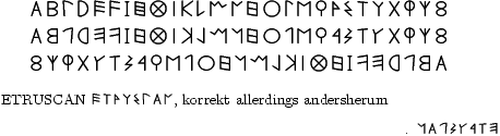 Beispiel für etruskische Schrift. Das Bild wurde von mir mit LaTeX erstellt. Es steht unter der FDL, wenn diese nicht gültig sein sollte, dann steht es zur freien Verfügung. MatthiasKabel 21:02, 10. Jan 2004 (CET)